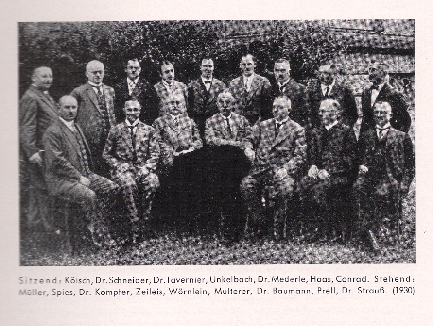 Scan eines Fotos aus dem Jahr 1930, veröffentlicht in der Jubiläumsschrift "Humanistisches Gymnasium Neustadt Weinstrasse 1880-1955": Lehrerkollegium des damaligen Humanistischen Gymnasiums Neustadt an der Haardt (heute Kurfürst-Ruprecht-Gymnasium Neustadt an der Weinstraße) mit dem jüdischen Lehrer Karl Strauß (stehend rechts hinten)